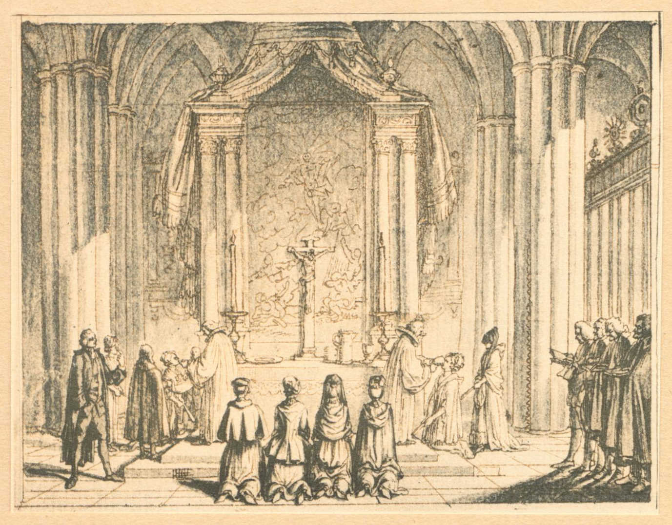 Tab. LXXXIV b. Kommunion in einer protestantischen Kirche. (Beschreibung lt. Quelle)